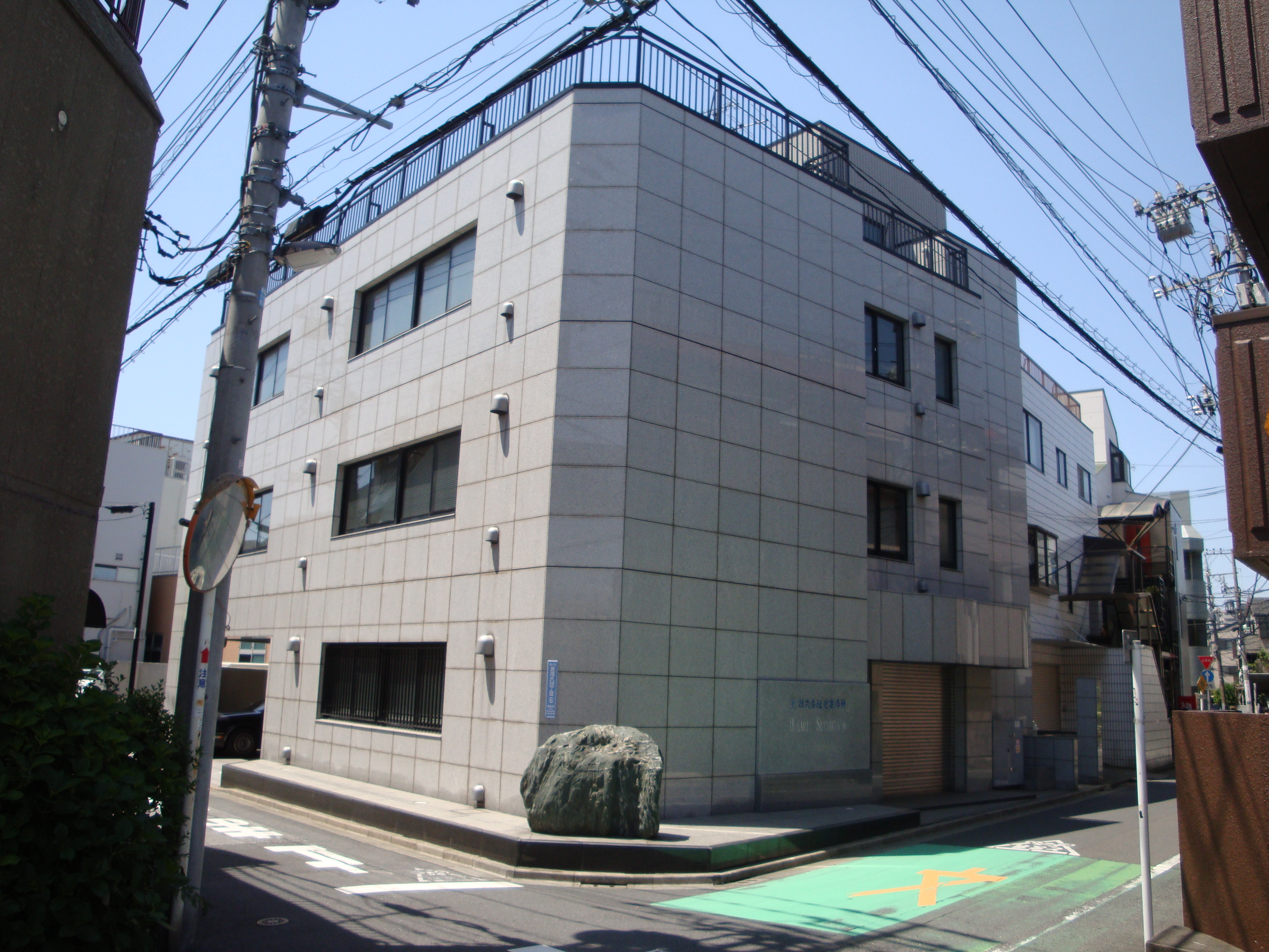 東京都荒川区東尾久にある光製作所「光流通倉庫」